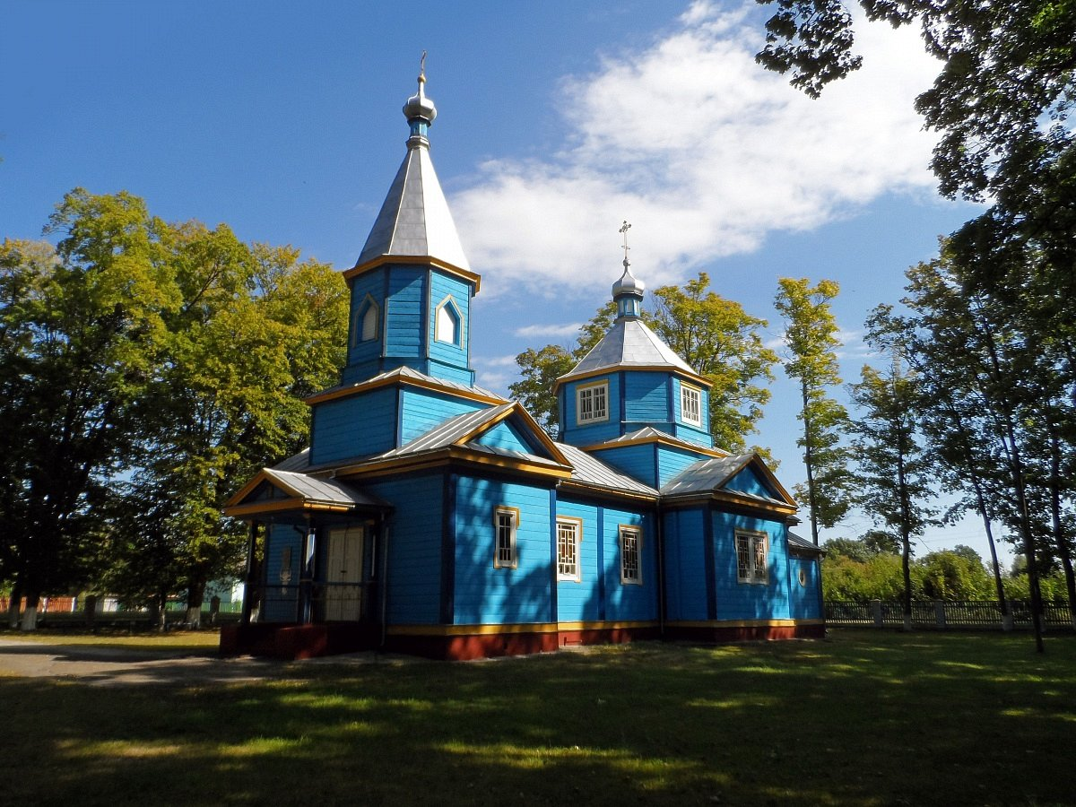 Ляхавічы. Свята-Раства-Багародзіцкая царква